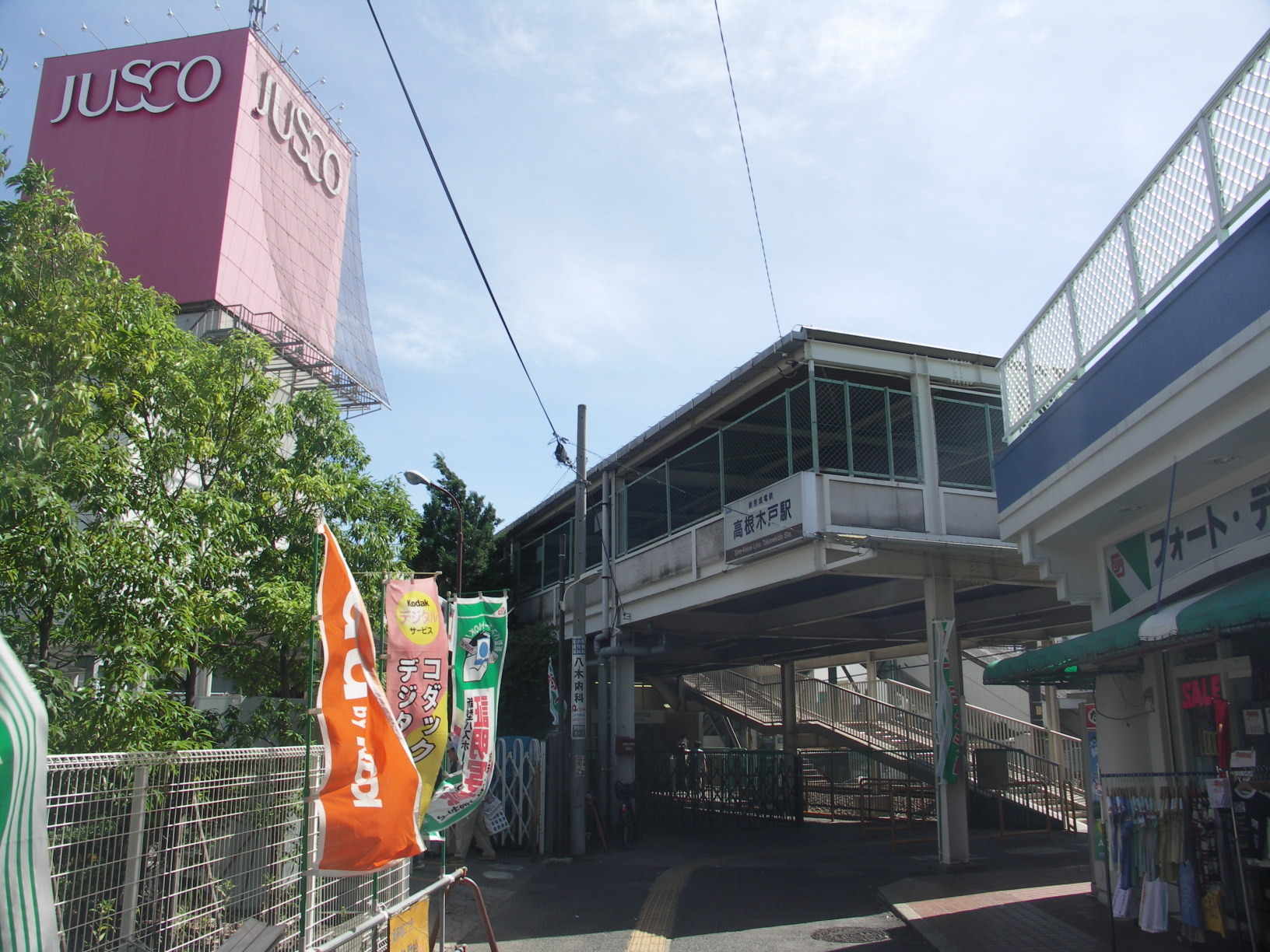 Takane-Kido station, Shin-Keisei Line, Chiba, Japan, 高根木戸駅